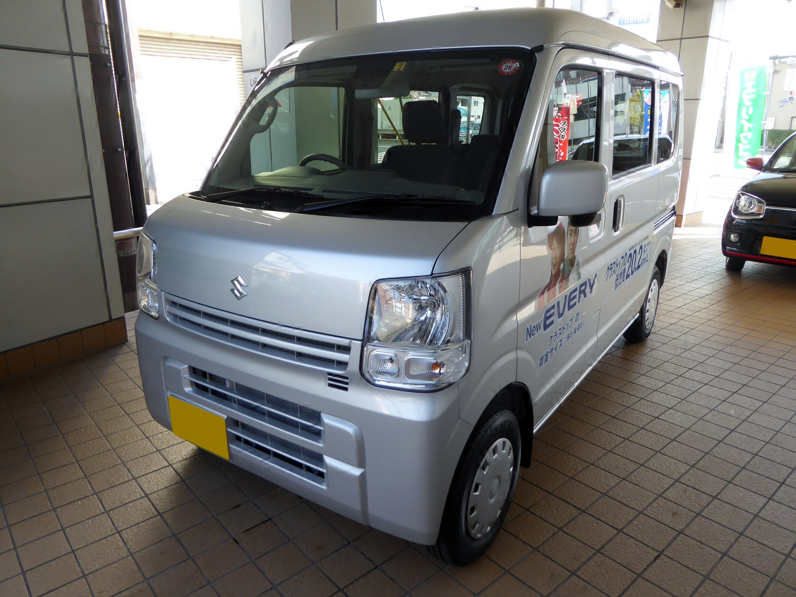 DA17V型スズキ・エブリイJOINターボをフロントから撮影。